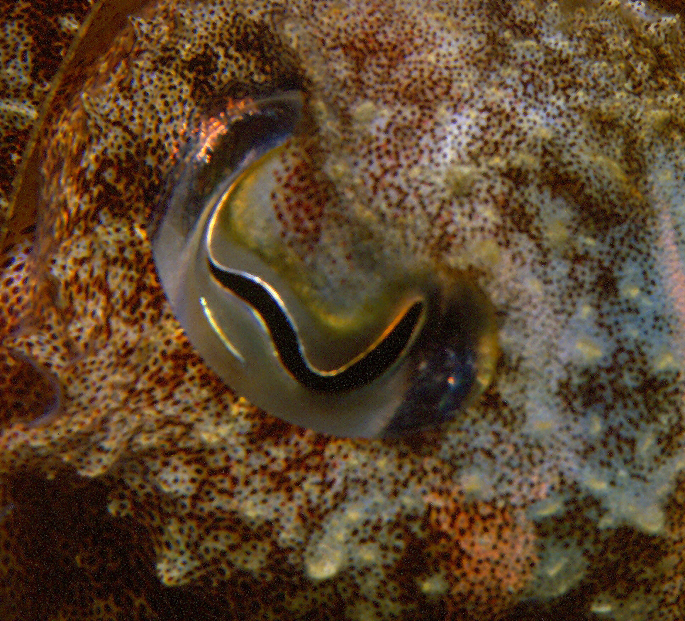 oeil de Sepia officinalis dont la pupille est en "oméga" inversé.